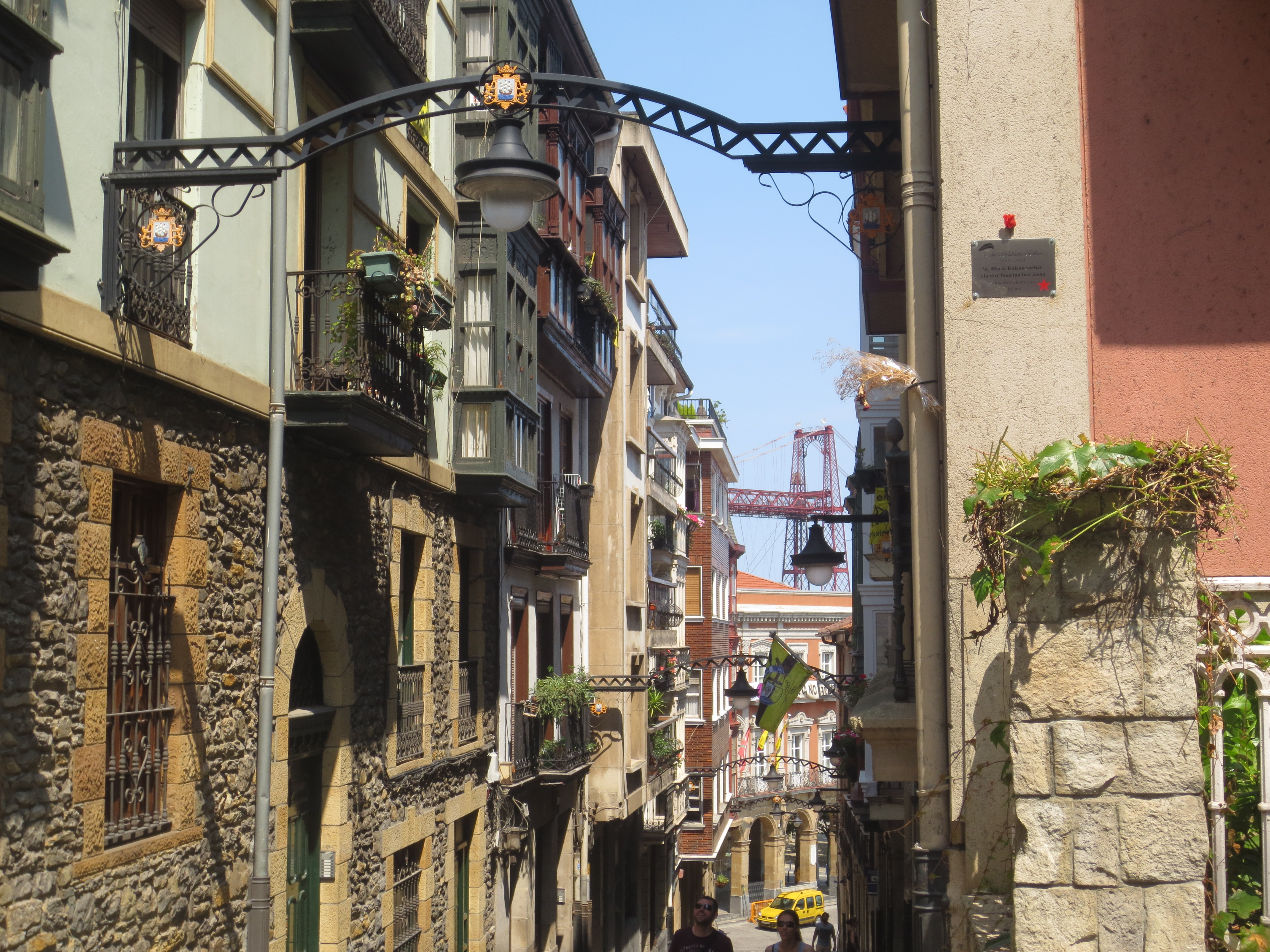 Pottugaleteko Santa Maria kalea eta bertan Periko Solabarriaren omenezko plaka. Atzean Bizkaia zubia.